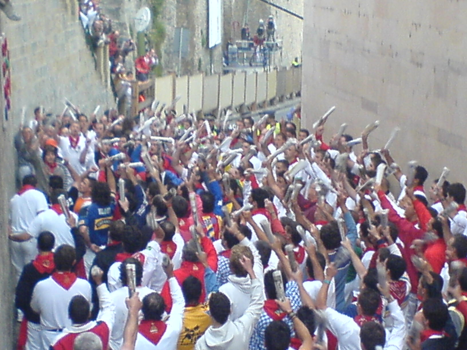 Prière Pampelune 2007.jpg